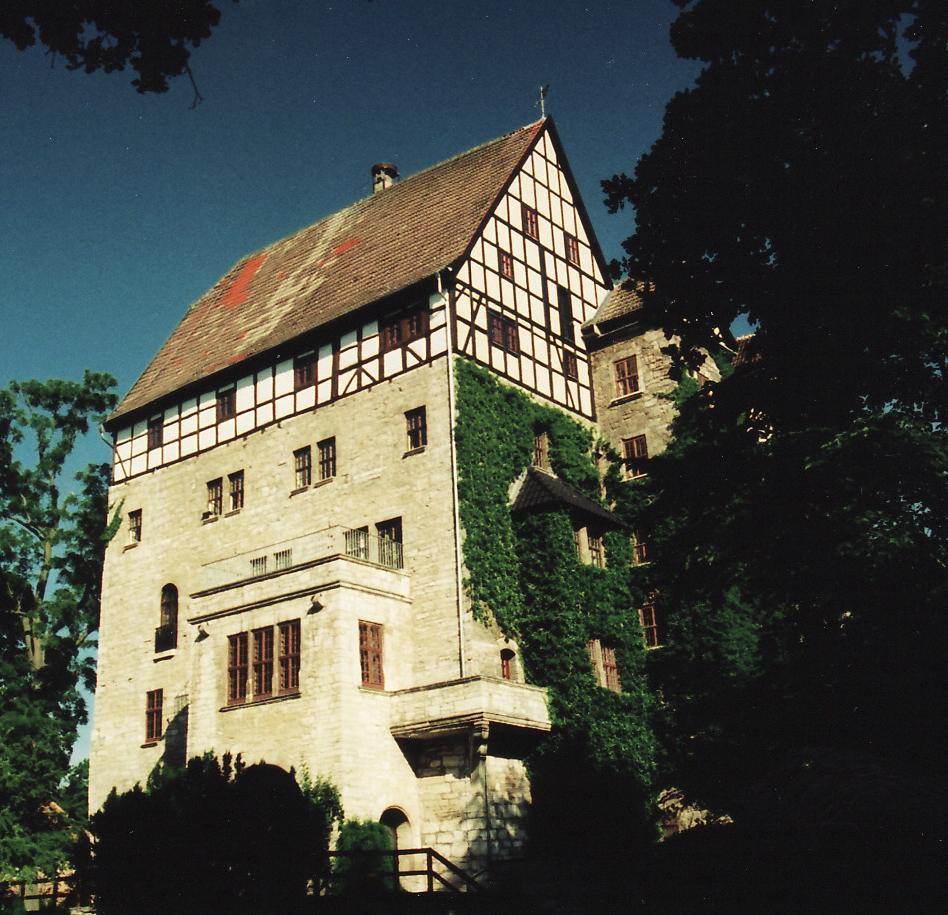 Wasserschloss Seebach von Süden. Steinbau mit aufgesetztem Fachwerkbau, umgeben von Parkanlage, an einem Morgen im Sommer.